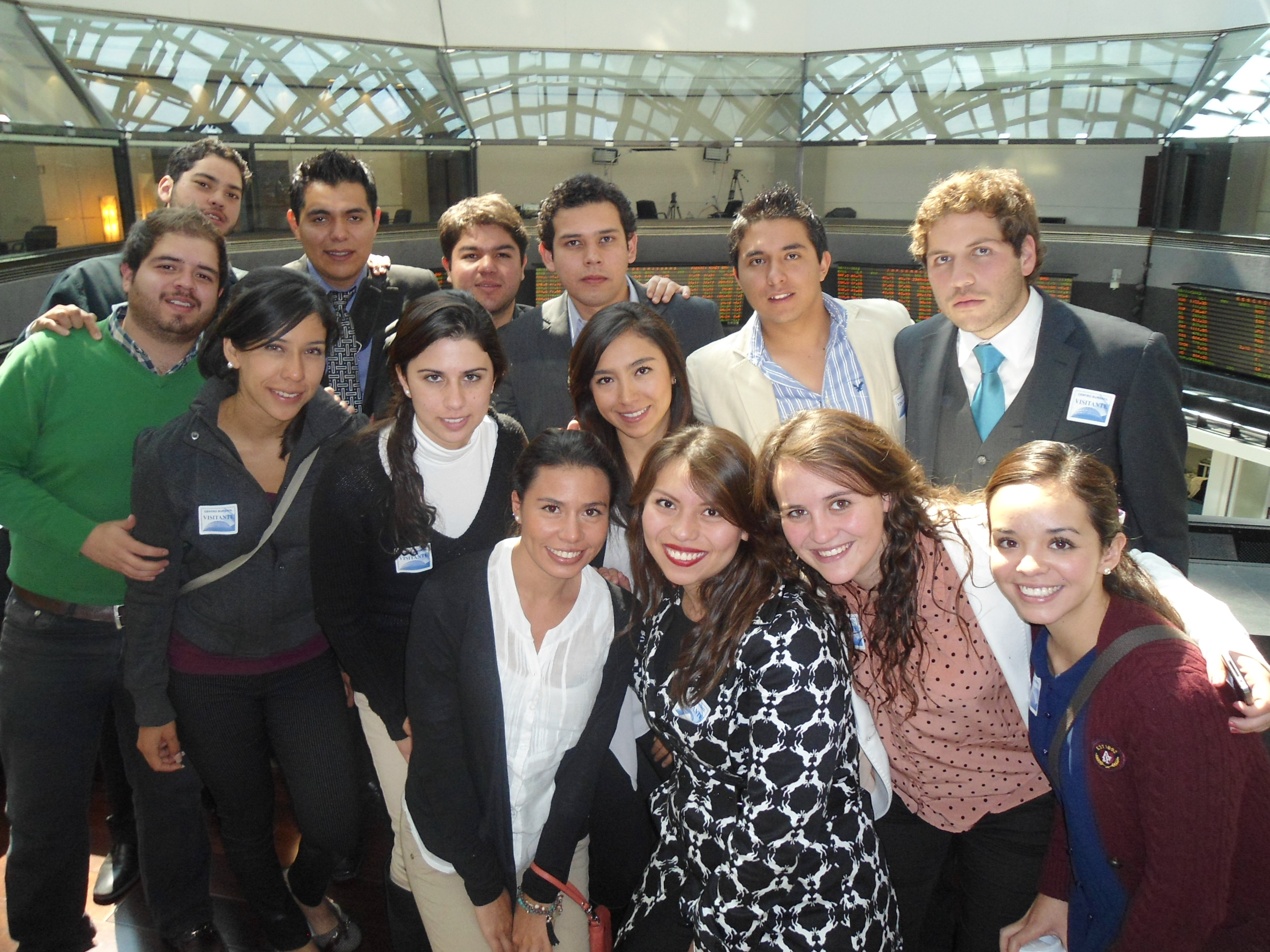 Equipo BMV